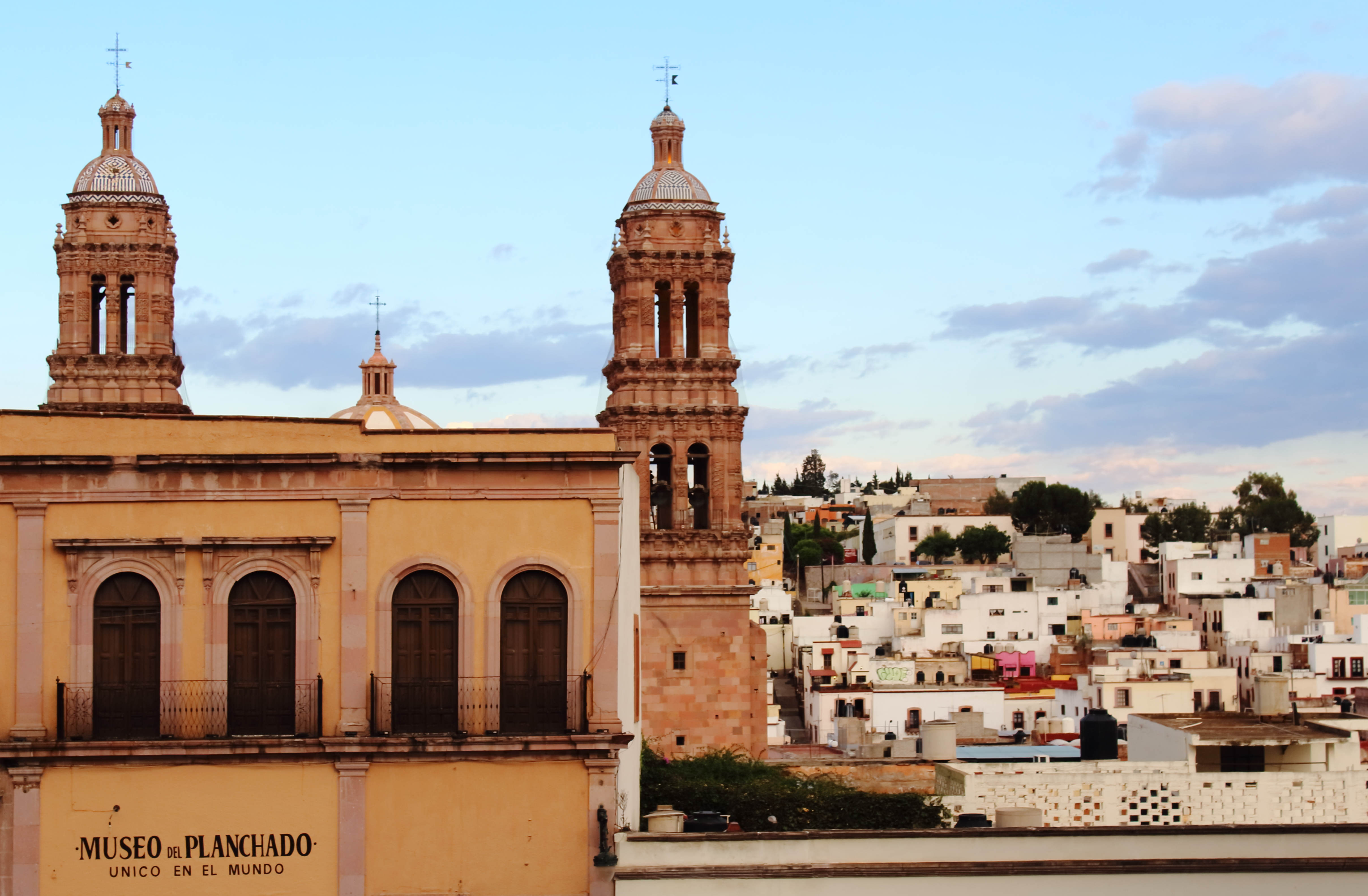 Museo del Planchado y paisaje en Zacatecas, México.